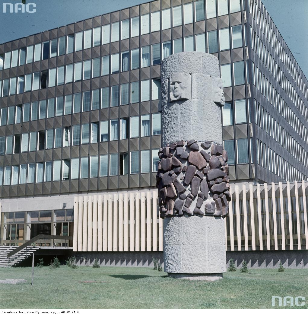 Pomnik Czynu Chłopskiego na tle siedziby Zjednoczonego Stronnictwa Ludowego (ZSL) przy ul. Grzybowskiej w Warszawie.